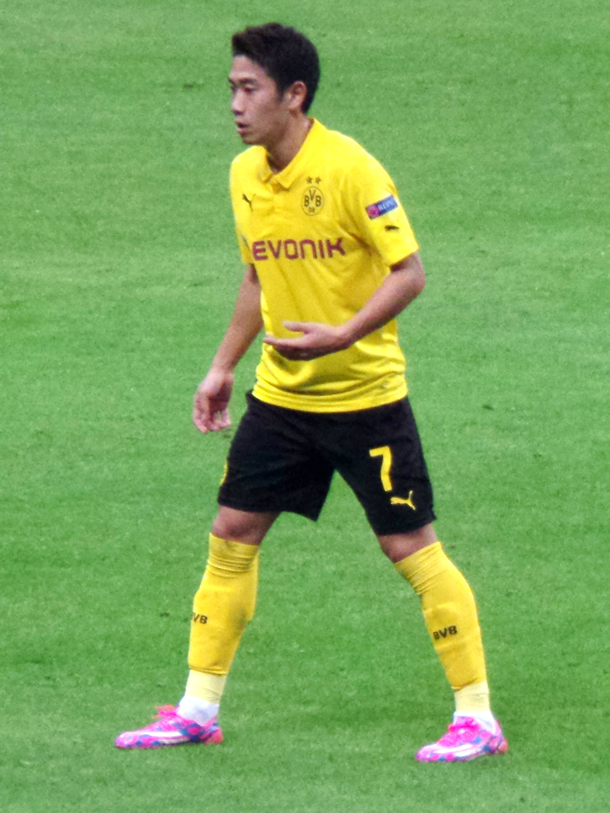 Shinji Kagawa'14